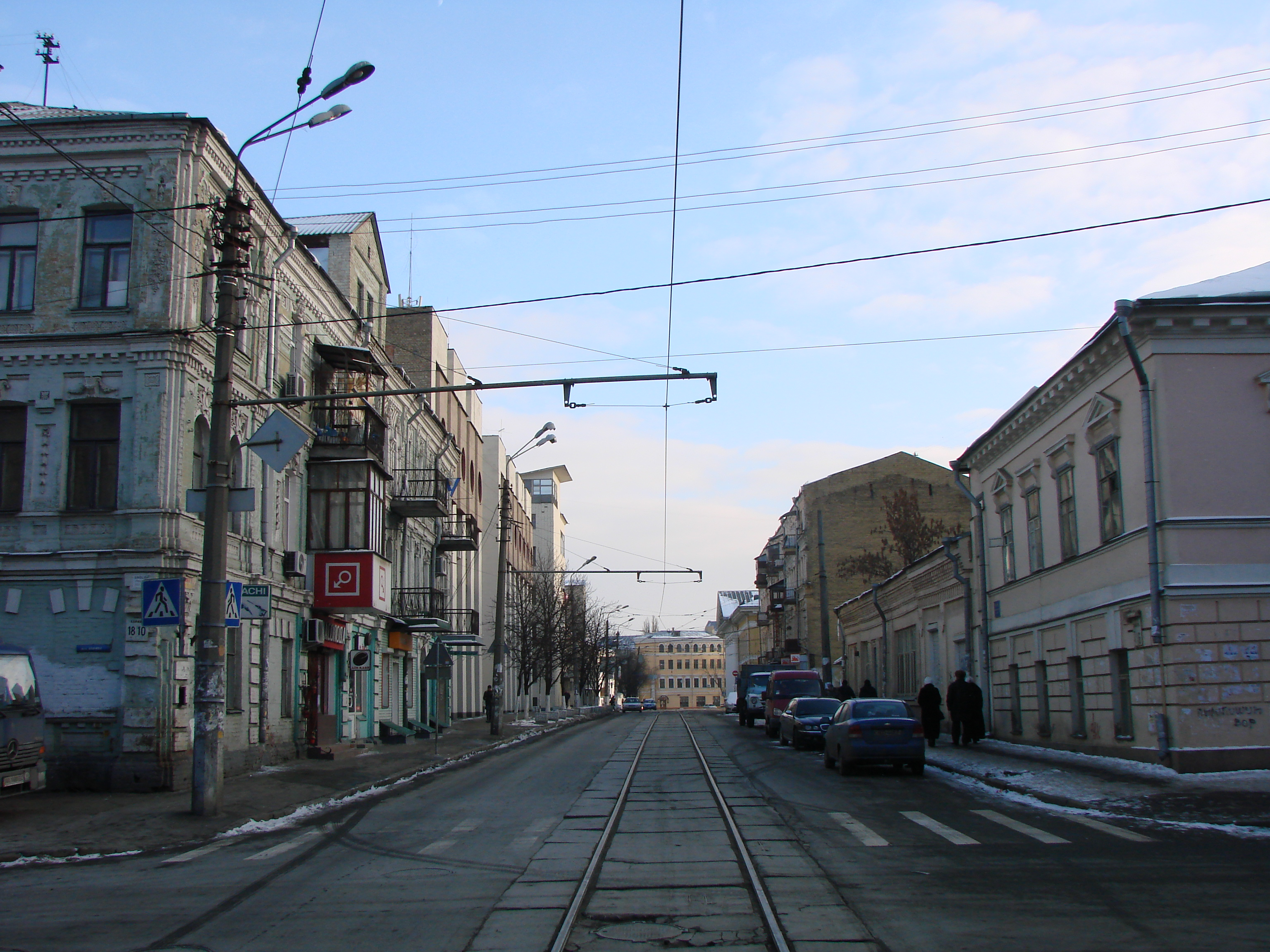 Межигірська вулиця у Києві